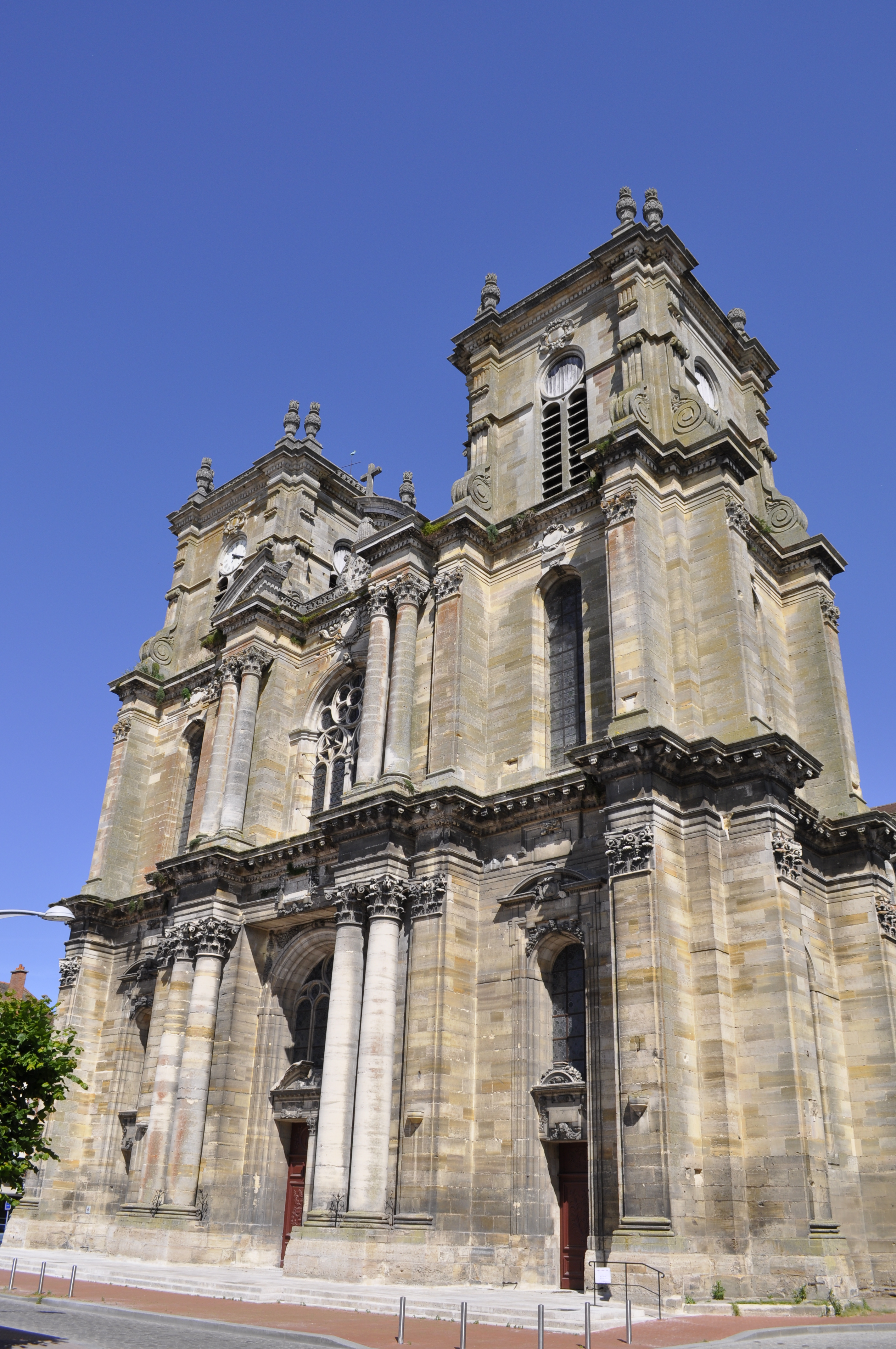 Vitry-le-François : centre ville, collégiale Notre-Dame, parvis (restauré en 2011).